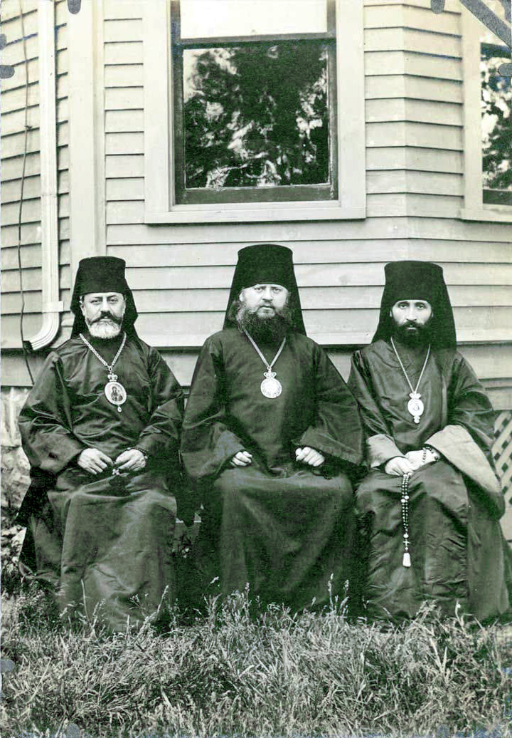 bishop Raphael, archbishop Platon, bishop Alexander seated beside a house